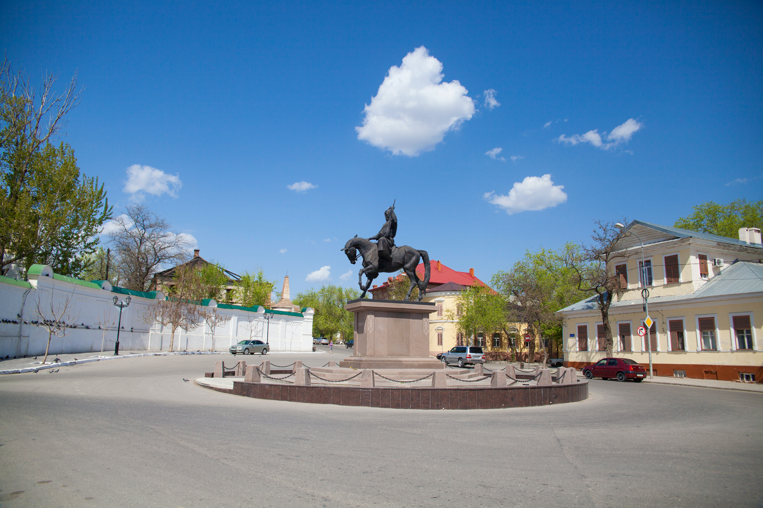 Luganda: Памятник Курмангазы Сагырбаева расположен в г. Астрахани.